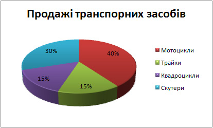 Секторна діаграма продаж технічних засобів.